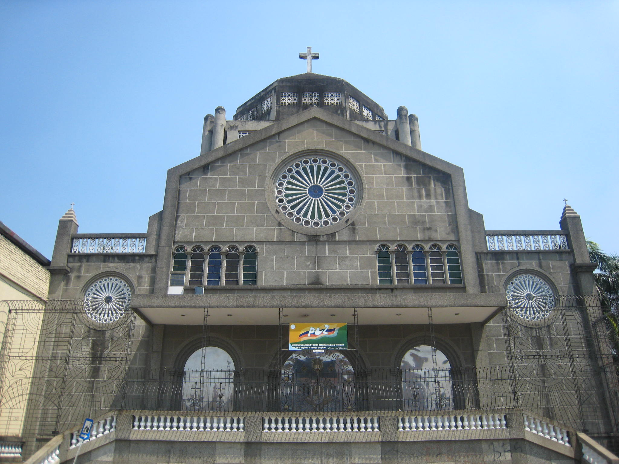 Iglesia el Templete, Cali, Colombia